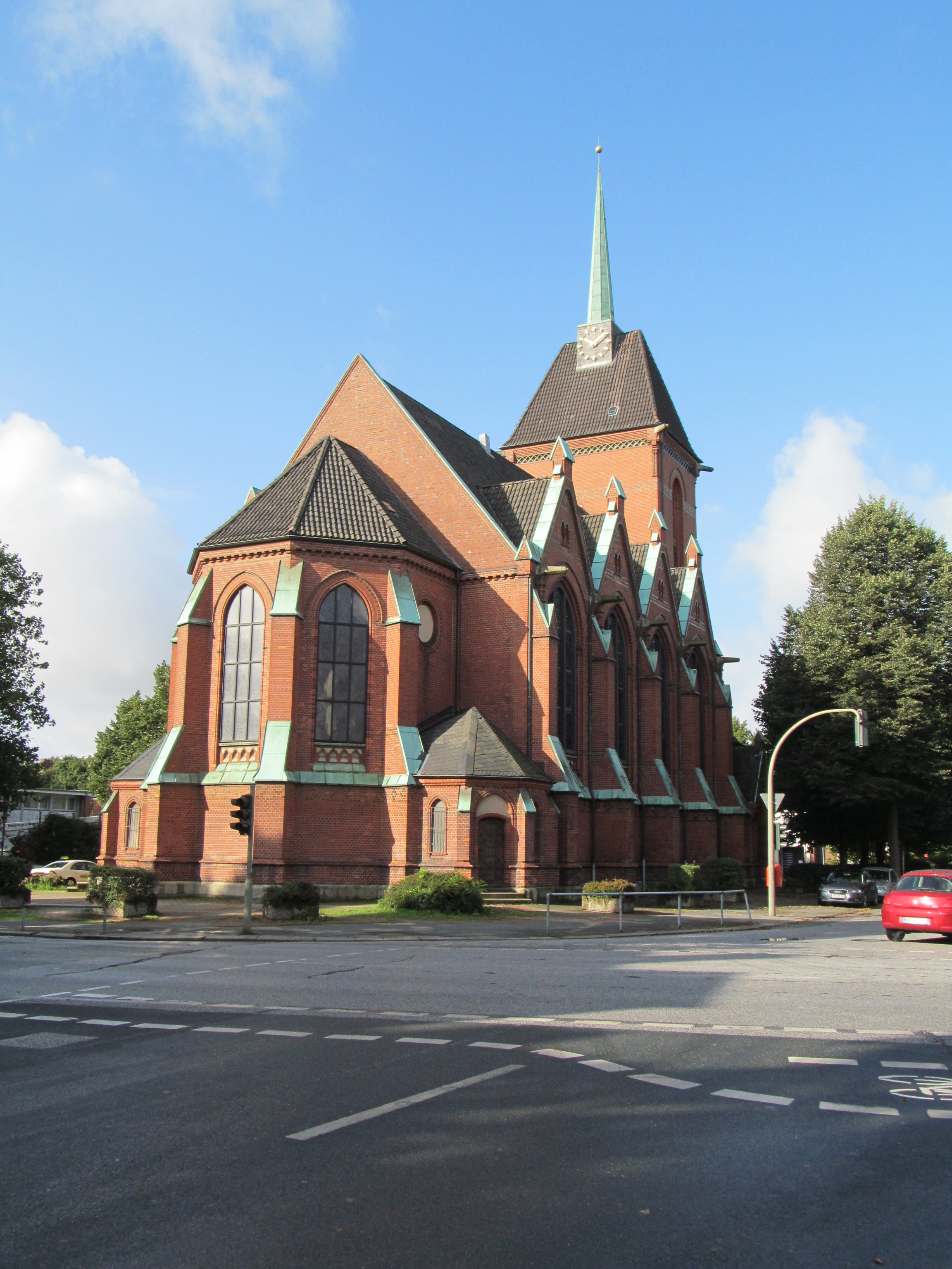 Friedenskirche Hamburg-Eilbek, Ansicht von Nordosten (2013)